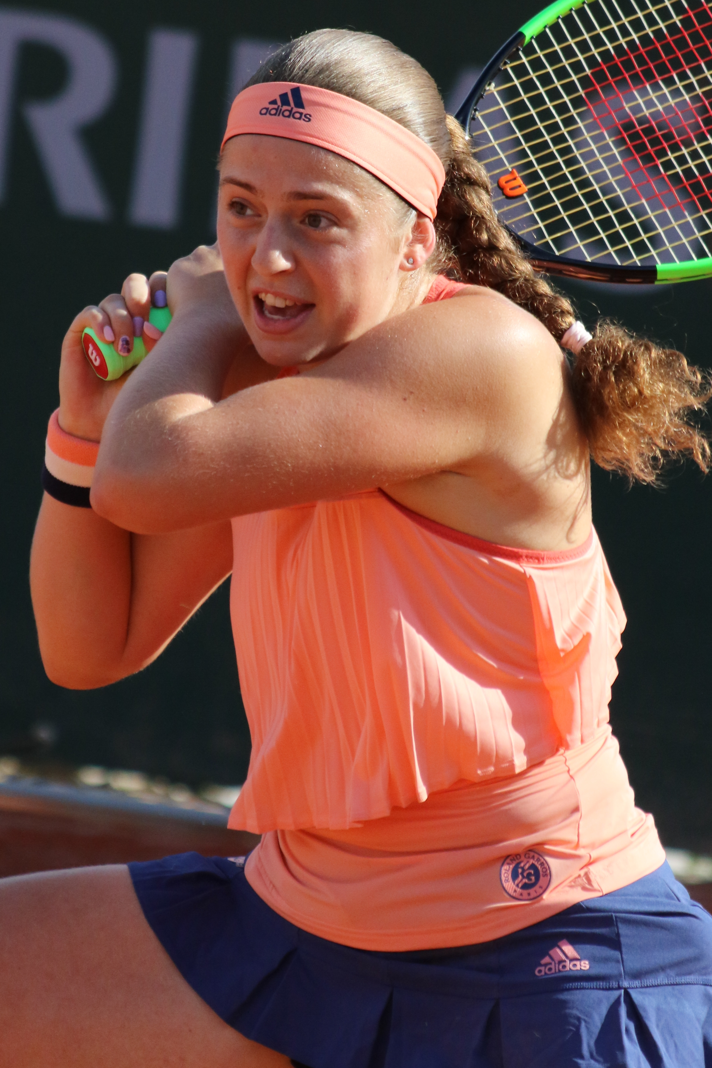 Ostapenko RG18 (9)